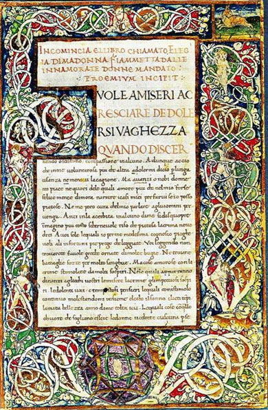 Elegia di Madonna Fiammetta, Oxford, Bodleian Library, ms. Add. C. 25 (S. C. 30227), c. 1r. Boccaccio visualizzato: narrare per parole e per immagini fra Medioevo e Rinascimento, a c. di V. Branca, Turin 1999, vol. II, p. 145.